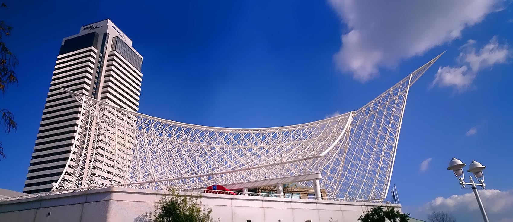 Kobe_maritime_museum